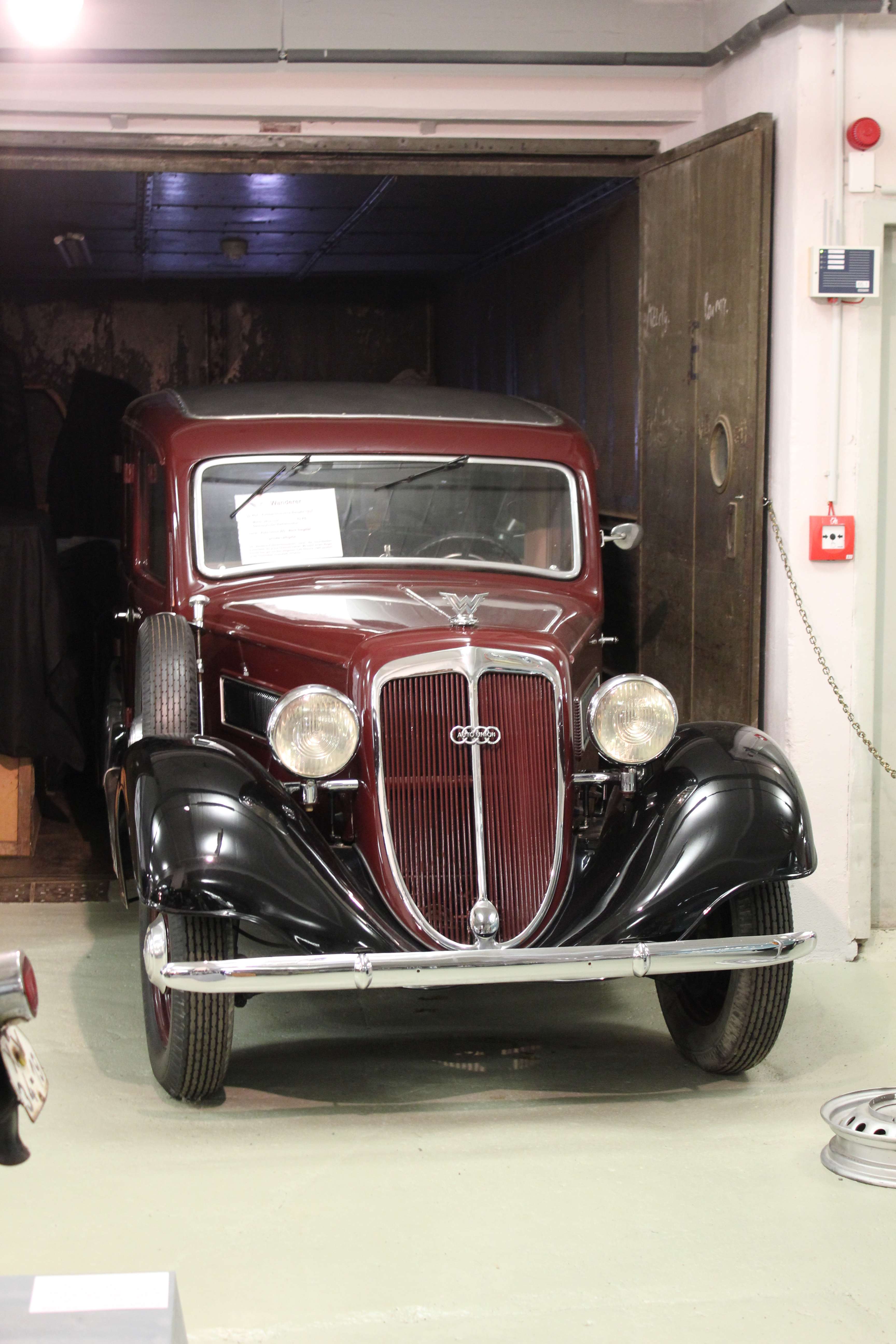 Wanderer-Pkw halb aus dem Aufzug der Sterngarage herausgefahren. Rechts neben dem Automobil ist das Tor zu sehen. Exponat des Museums für sächsische Fahrzeuge